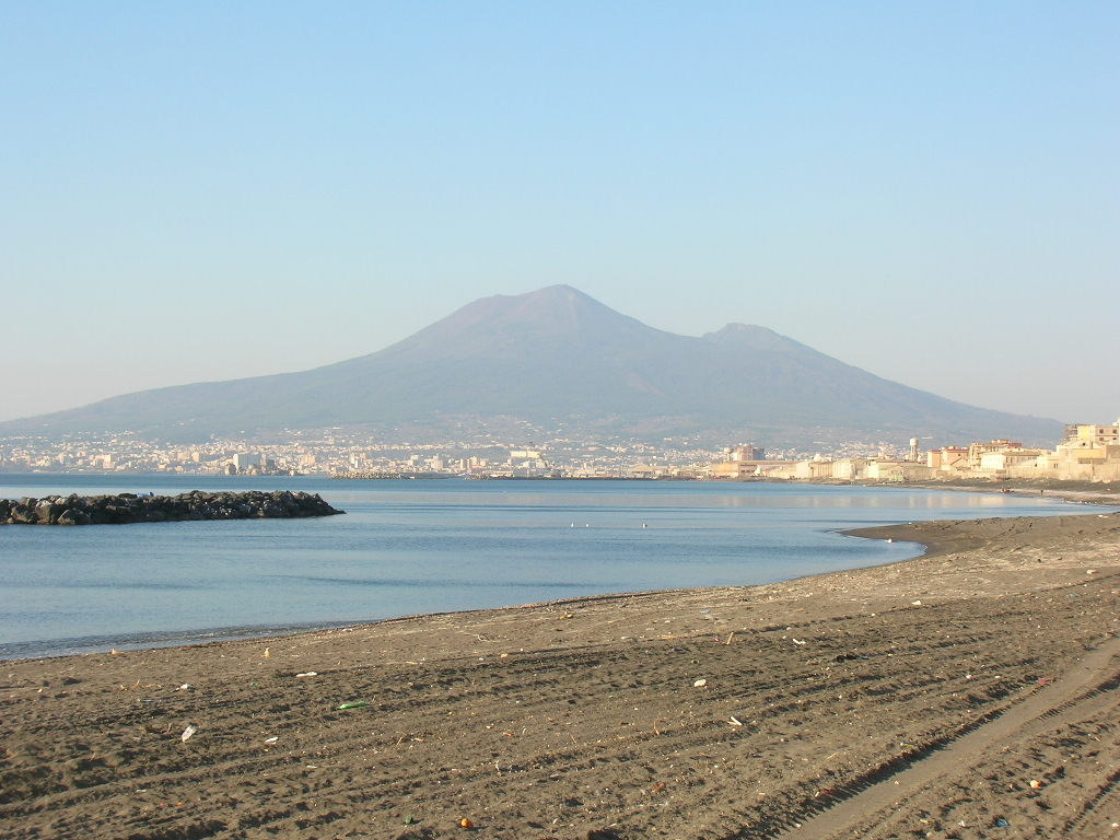 Castellammare di Stabia: panorama con il Vesuvio